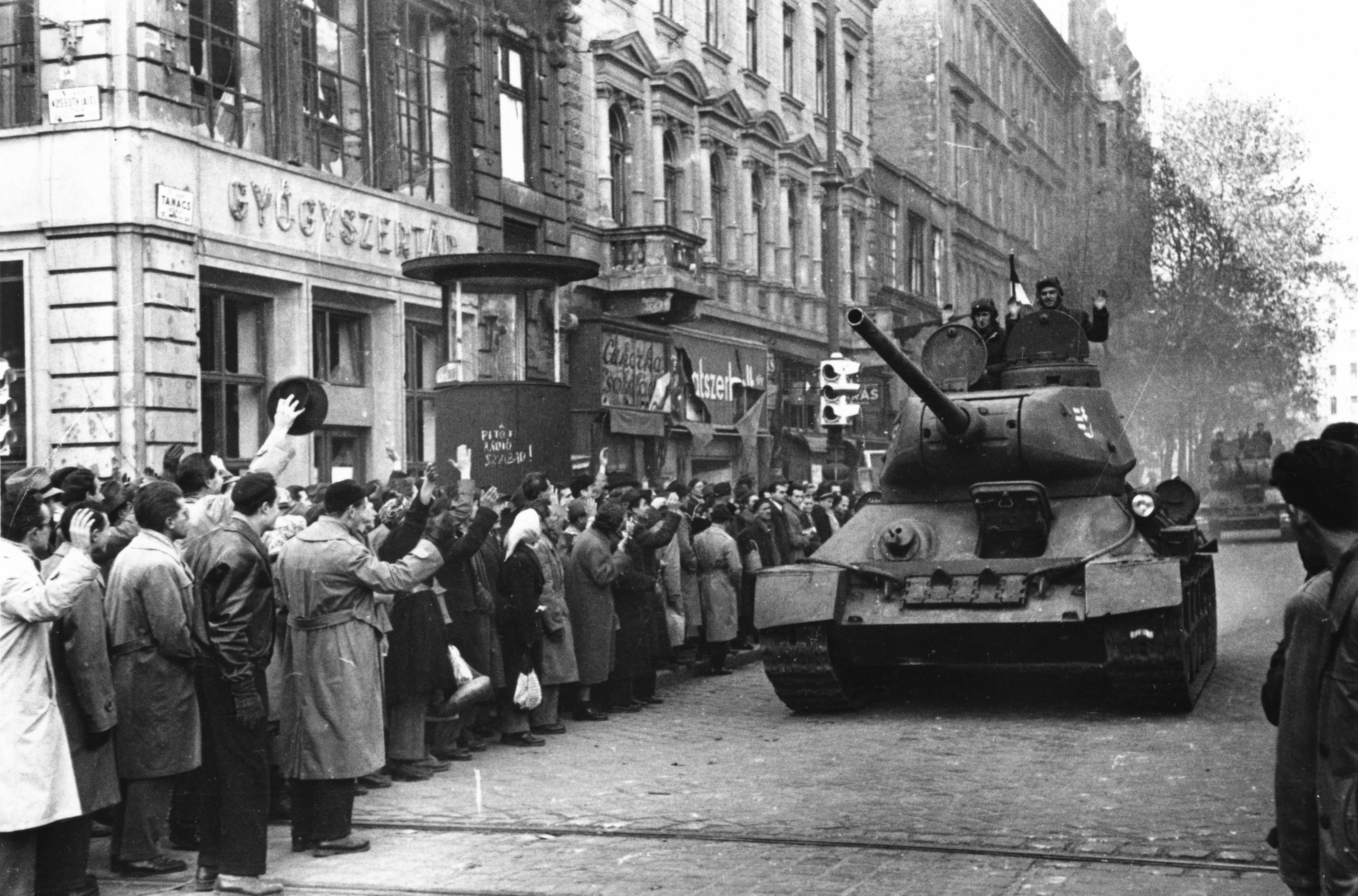 Kossuth Lajos utca - Károly (Tanács) körút sarok. Location: Hungary, Budapest V. Tags: military, tank, crest, Soviet brand, street view, revolution, sign-board, Budapest Title: Kossuth Lajos utca - Károly (Tanács) körút sarok.